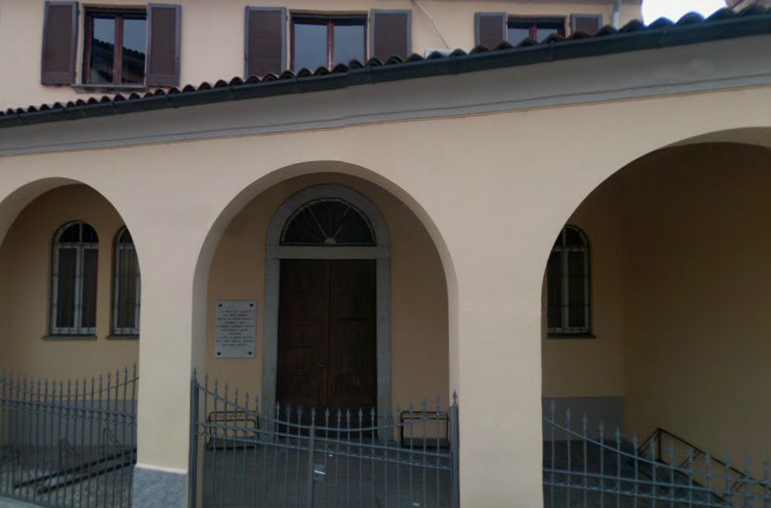 Ingresso della chiesa della Santa Famiglia Nazarena a Boffalora sopra Ticino (MI) - Italy